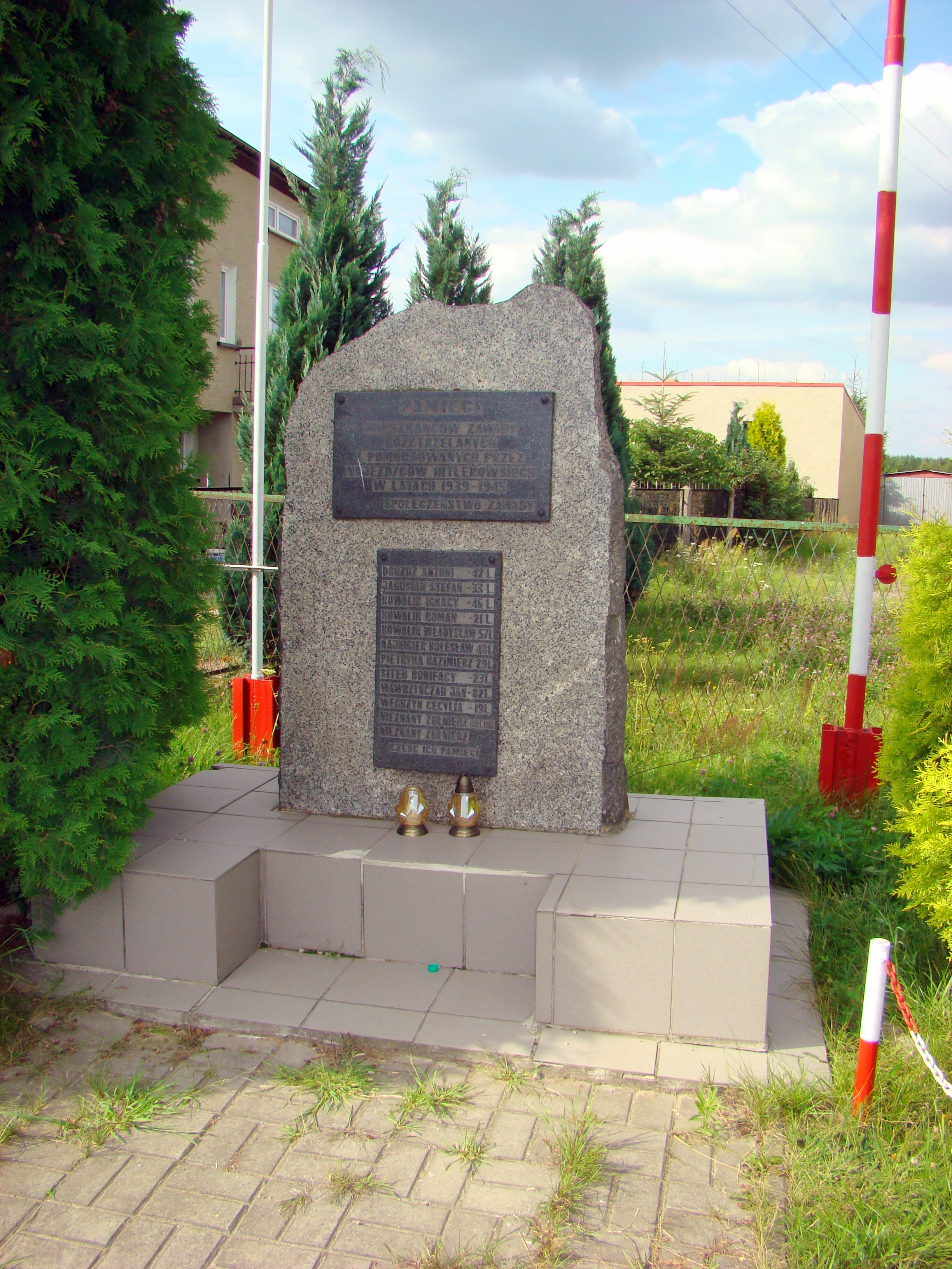 Pomnik upamiętniający mieszkańców Zawady rozstrzelanych i pomordowanych przez najeźdźców hitlerowskich w latach 1939-1945. Zawada, w gminie Kamienica Polska, powiecie częstochowskim, w województwie śląskim.